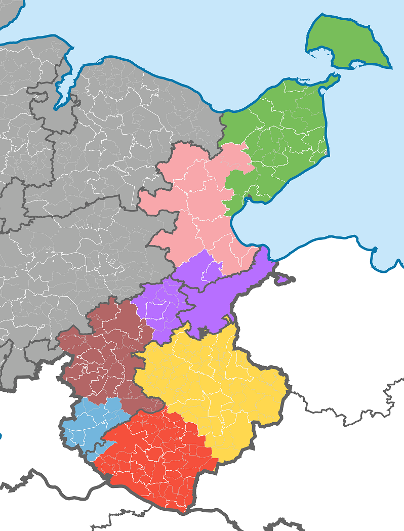 Karte der Amtsgerichtsbezirke im Landgerichtsbezirk Lübeck Amtsgericht Oldenburg in Holstein Amtsgericht Eutin Amtsgericht Lübeck Amtsgericht Ahrensburg Amtsgericht Ratzeburg Amtsgericht Reinbek Amtsgericht Schwarzenbek